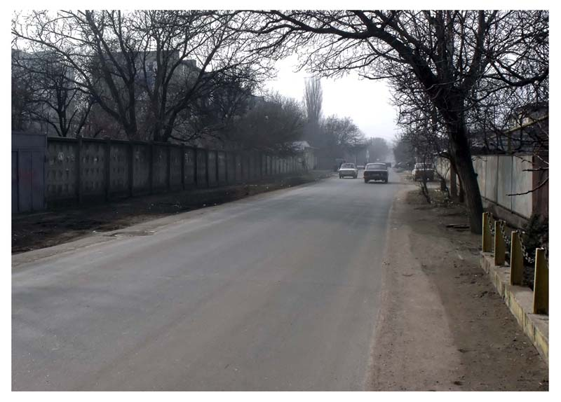 вул. Магістральна, Ленселище, Одеса